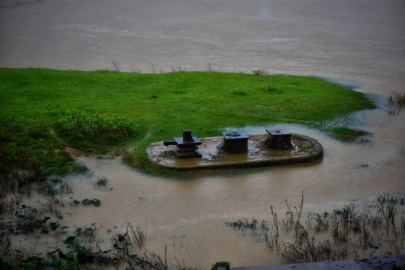 Varada River, Banavasi